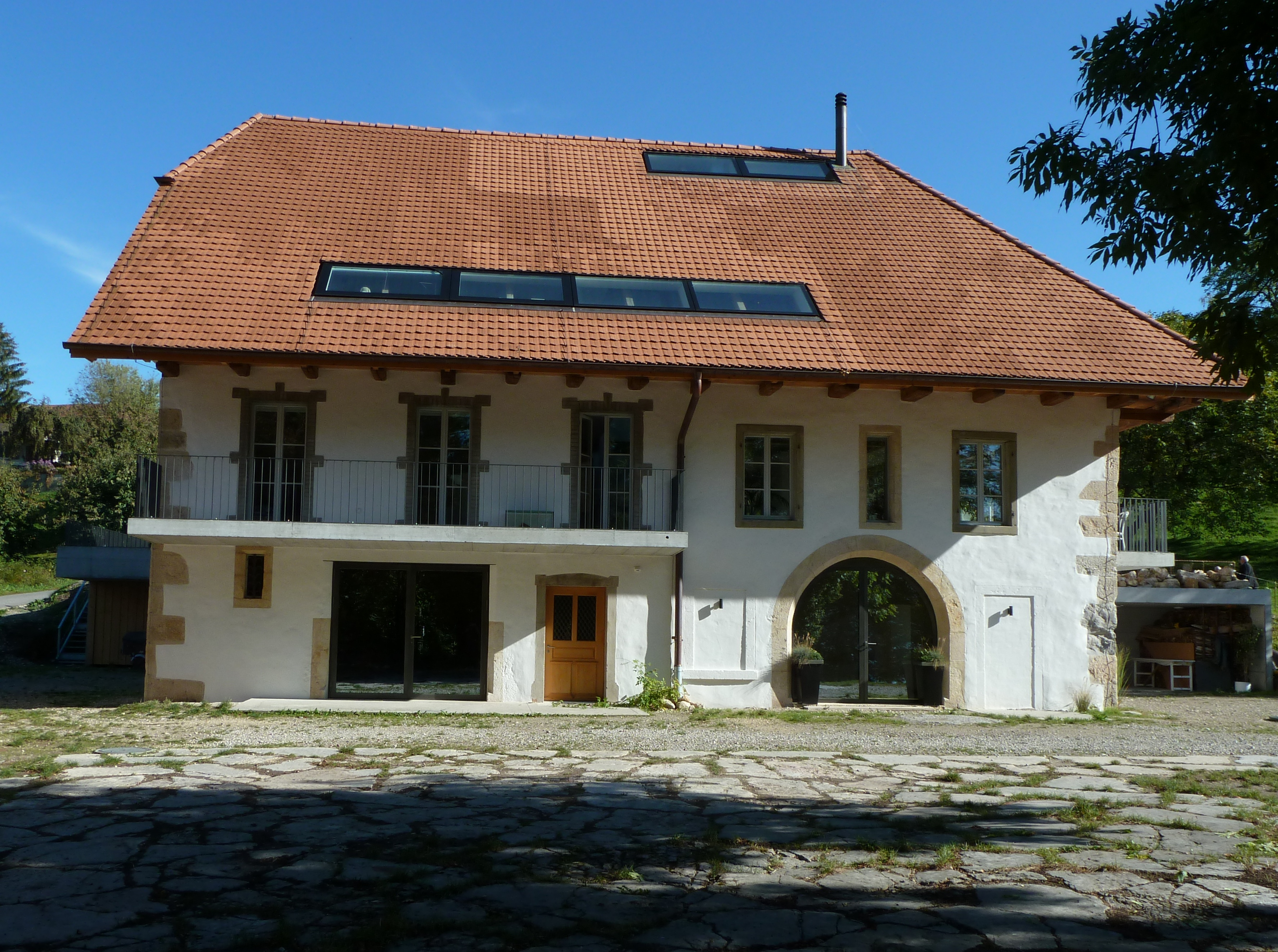 Ländehaus Sutz-Lattrigen